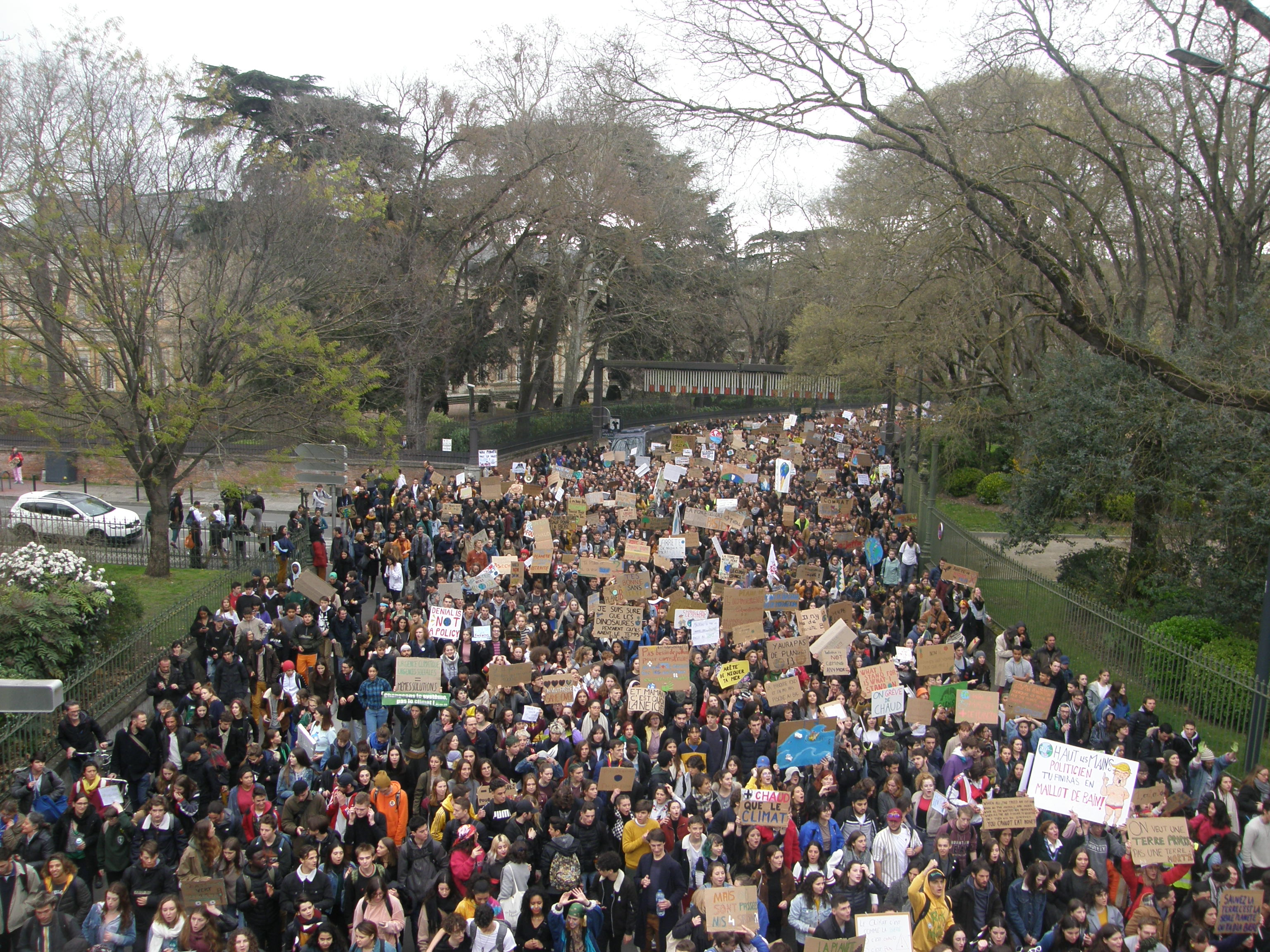 Grève pour le climat à Toulouse du vendredi 15 mars 2019 au Grand Rond.